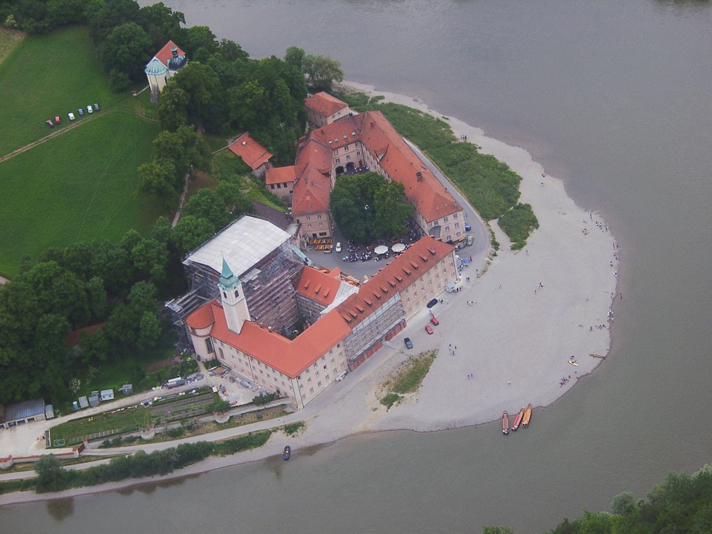 Aufnahme von Report selbst am 15.Juni 2002 - 17 °° Uhr aus einem Sportflugzeug über ca. 200 mtr. Höhe- aus Nähe des Donaudurchbruch!